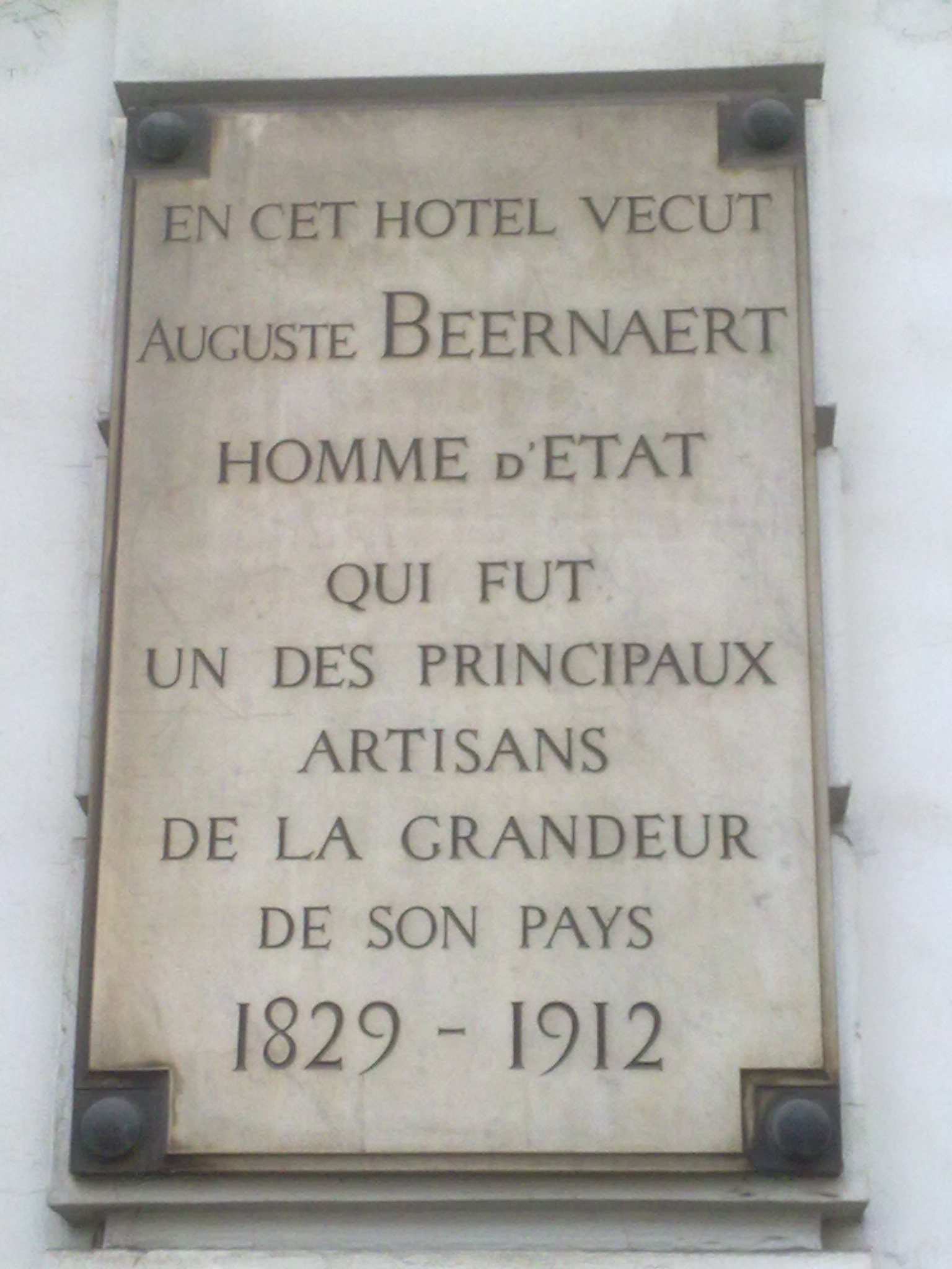 Plaque commémorative sur l'hôtel où vécu Auguste Beernaert (1829-1912), 1 Place du Luxembourg à Ixelles (Bruxelles)